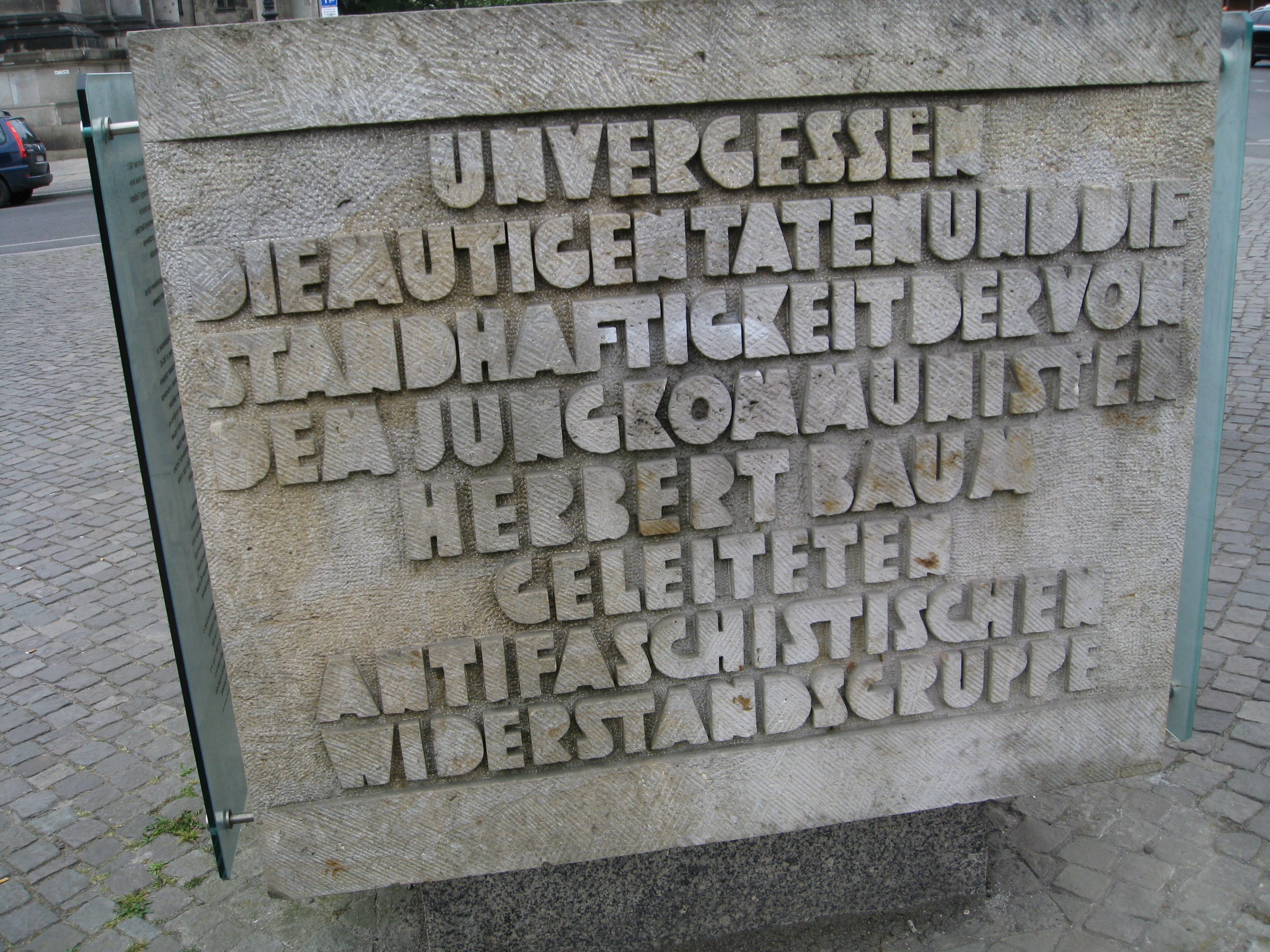 Herbert-Baum-Memorial, Lustgarten Berlin: "Unvergessen die mutigen Taten und die Standhaftigkeit der von dem Jungkommunisten Herbert Baum geleiteten antifachistischen Widerstandsgruppe" -- that means "Not forgotten: the courageous deeds and the steadfastness of the Young Communist antifascist resistance group led by Herbert Baum"